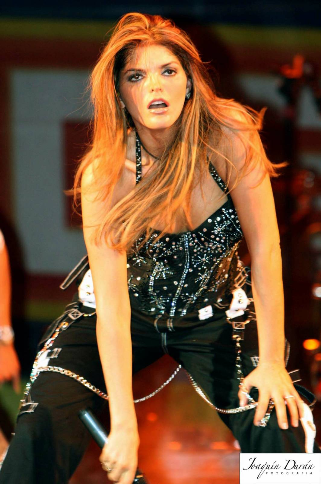 Ana Bárbara en 2007.